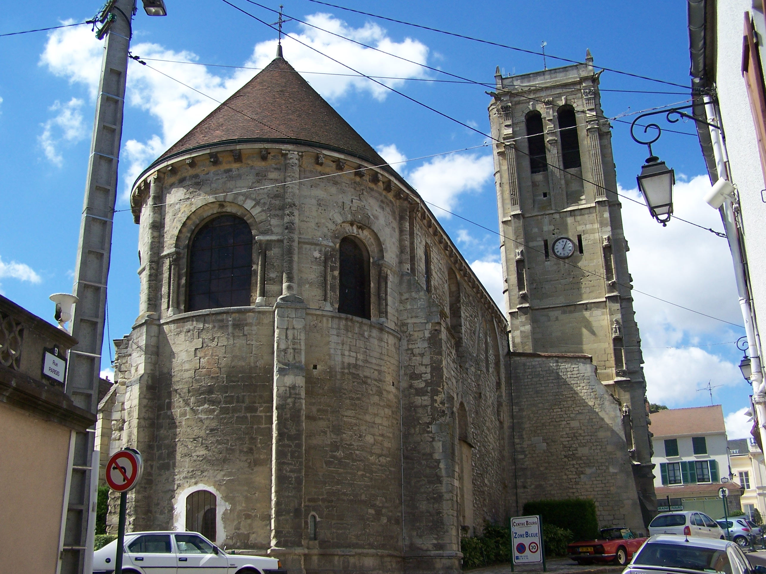 Église de Maule (Yvelines, France). Photo personnelle. Church of Maule (Yvelines, France). Personal photo. Auteur/Author : ℍenry Salomé